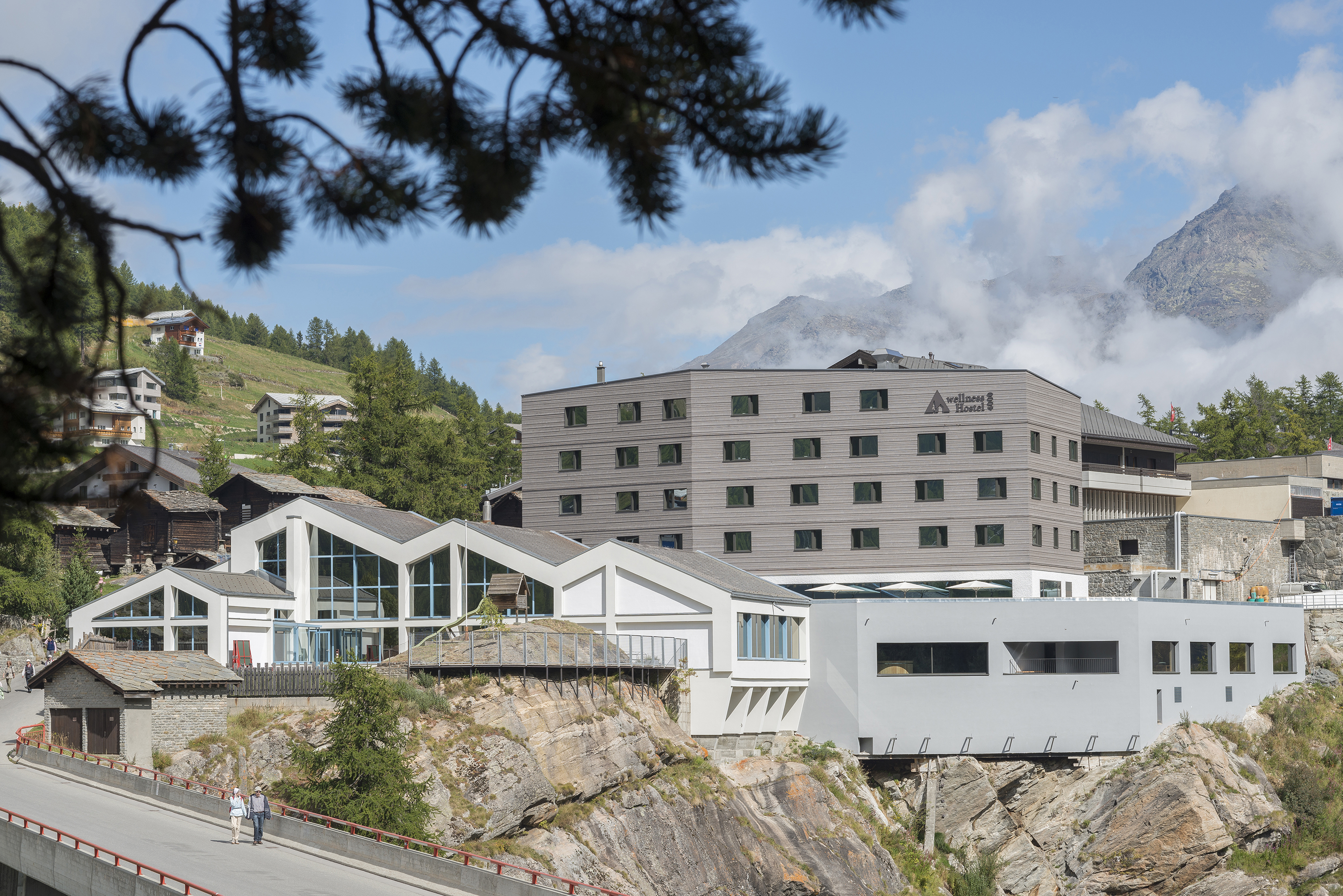 wellnessHostel4000 in Saas-Fee: Jugendherberge und Wellness-Oase in einem